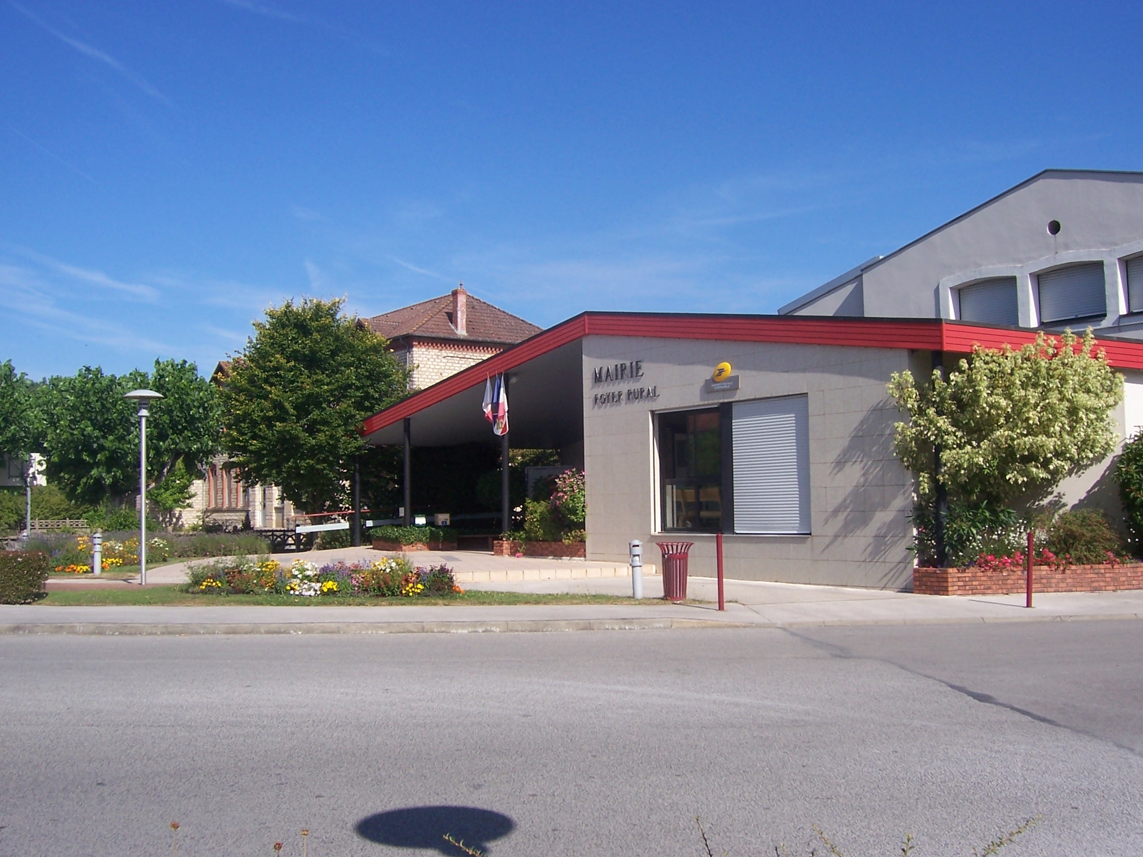 Mairie de Sornay